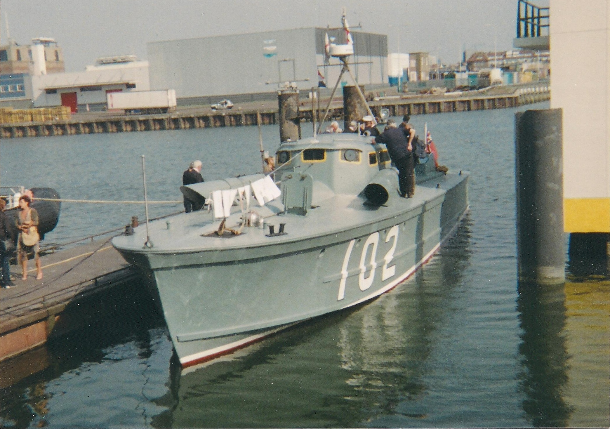 Engelse Motor Torpedo Boat waarmee Hans Hoets in 1944 het Kanaal overstak